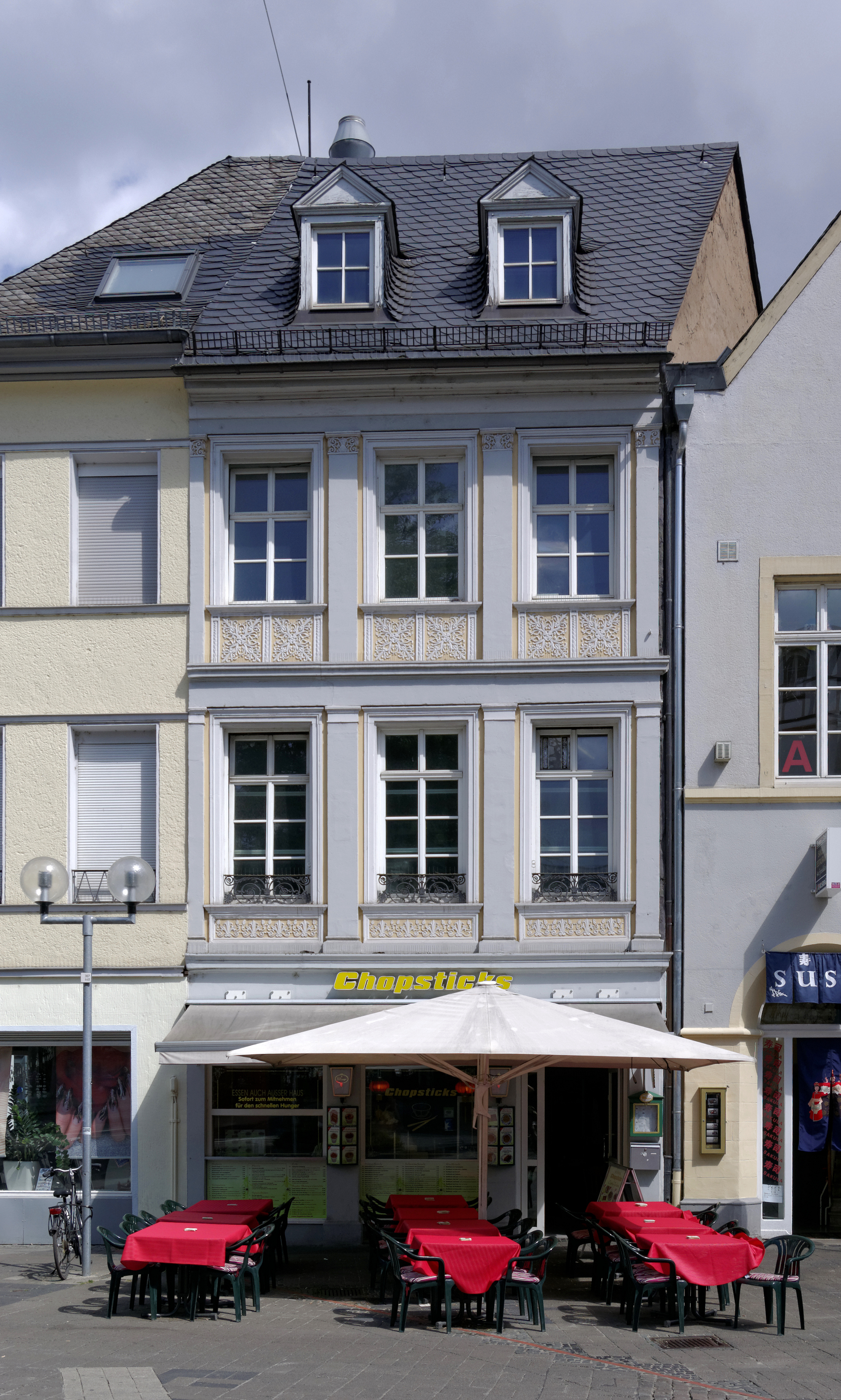 Trier, Fleischstraße 39; dreiachsiger Fassadenabschnitt mit pilastergegliederten Obergeschossen, Brüstungsplatten und -gittern, 1840er Jahre, Architekt wohl Peter Bentz